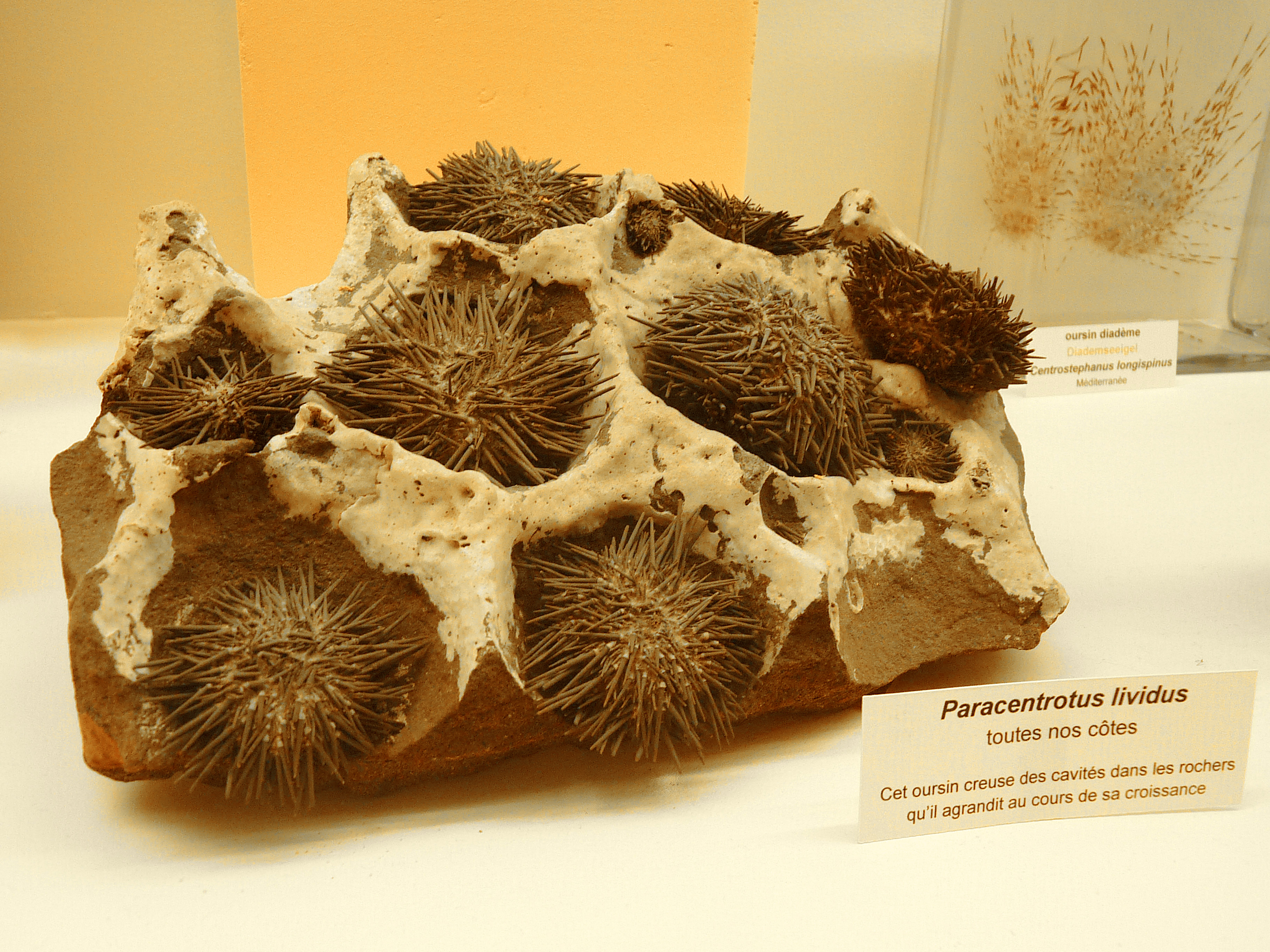 Paracentrotus lividus au Musée zoologique de Strasbourg